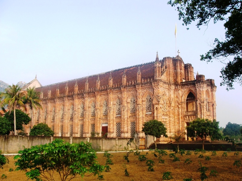 Công trình kiến trúc Đan Viện Châu Sơn - Nhà thờ dòng khổ thu ở Phú Sơn, Nho Quan, Ninh Bình